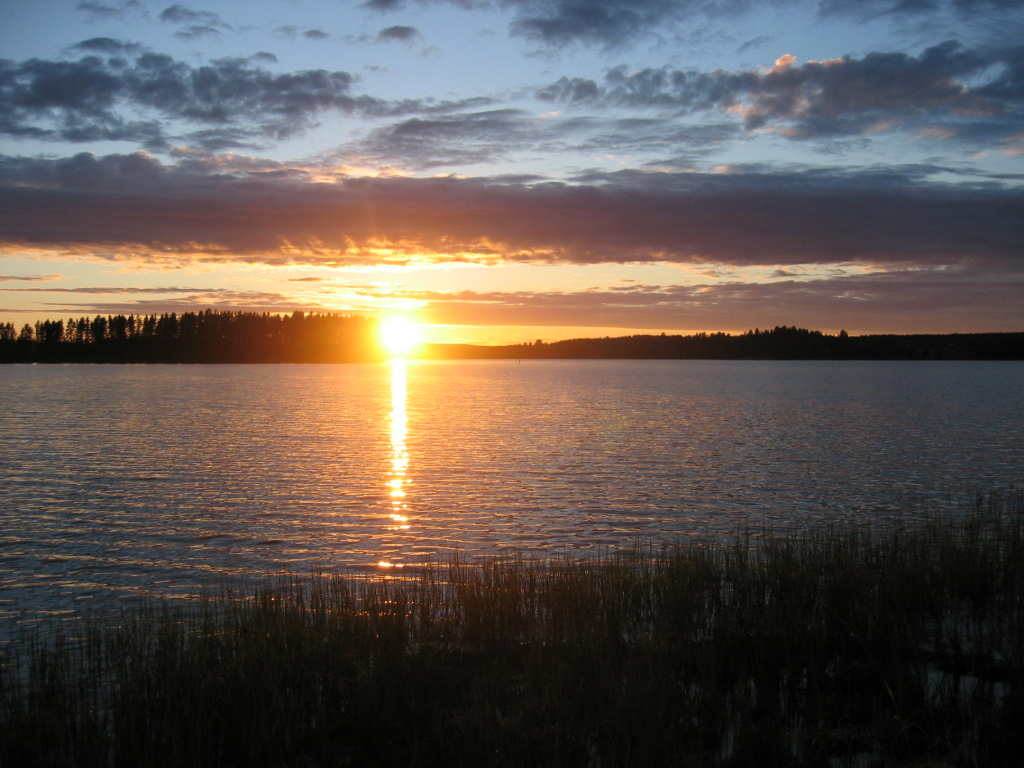 Auringonlaslu Kyrösjärvellä Tevaniemen selällä